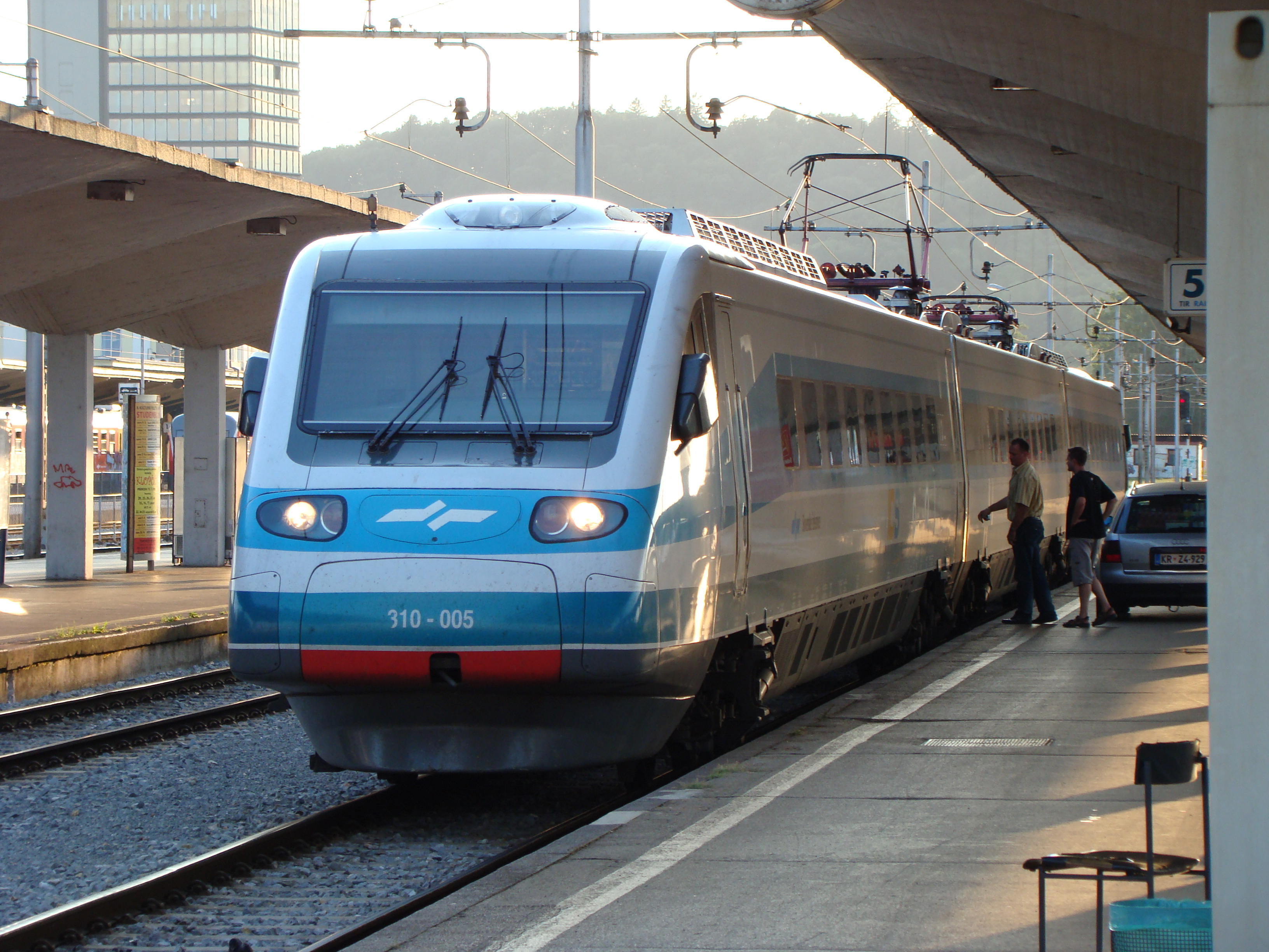 A SŽ 310 series EMU in Ljubljana, Slovenia